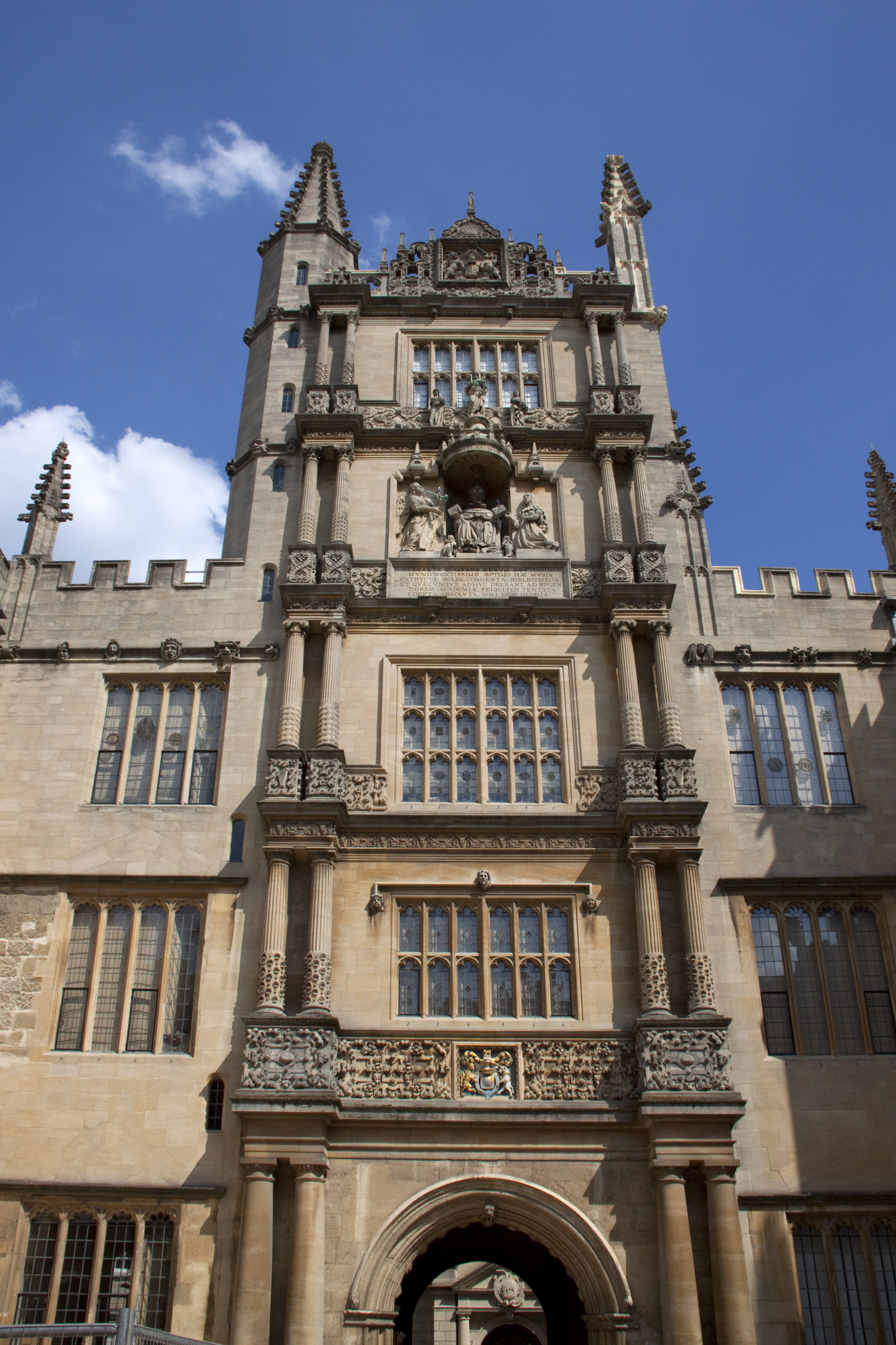 Bodleian Library 2